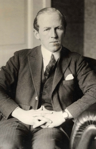 portrett, mann, ingeniør, medstifter og formann på livstid i Fedrelandslaget, sittende knefigur i skinnstol.